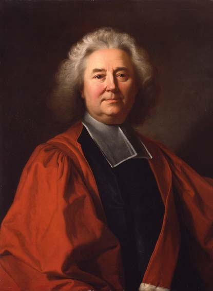 Portrait de l'abbé René Pucelle (1655-1745)